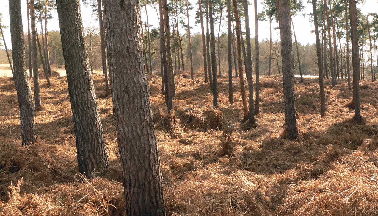 Sassenburg